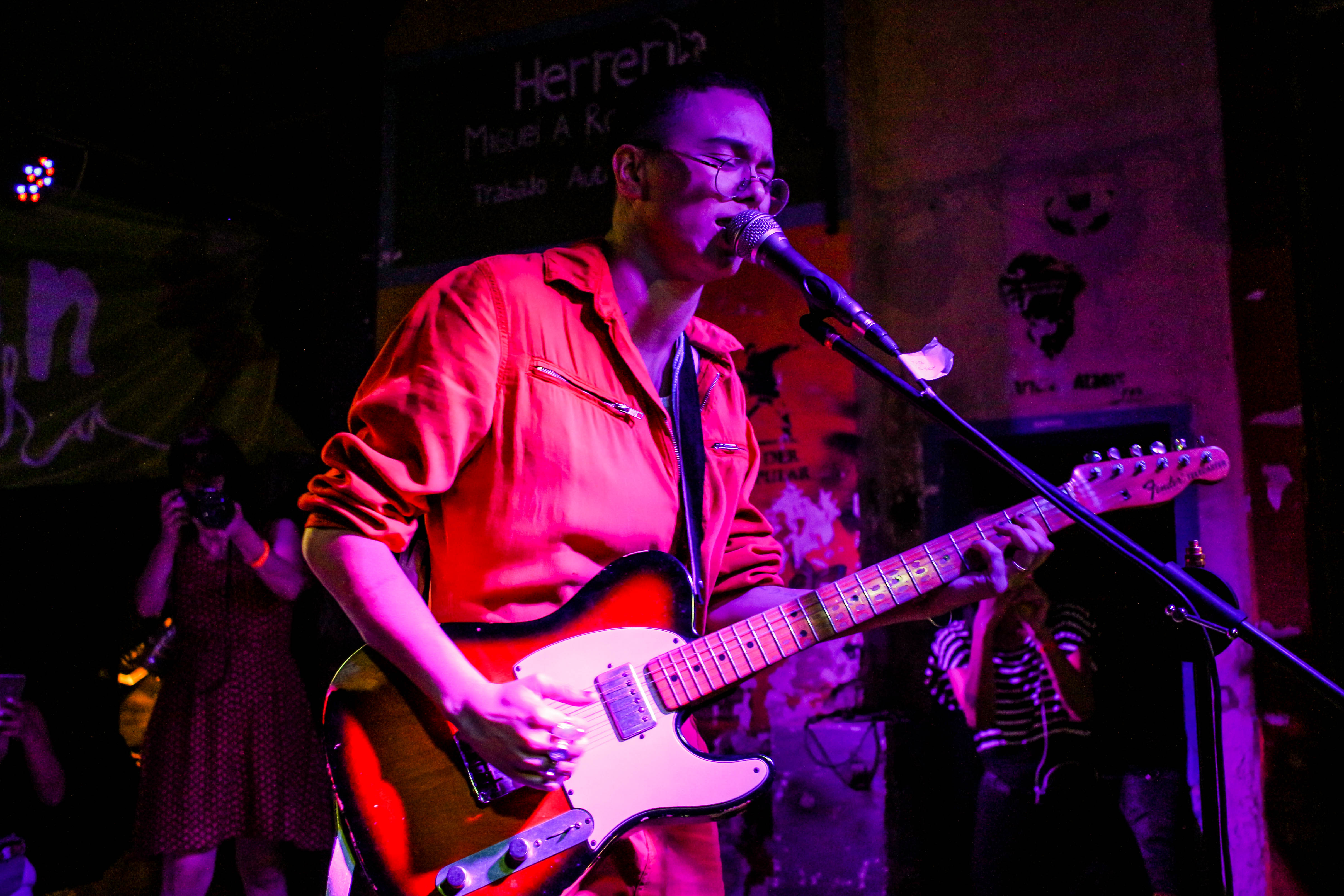 Presentación de Maria Gadú en el concierto de apertura del 3º Encuentro Latinoamericano de Feminismos, Ella. La Plata, diciembre de 2019.